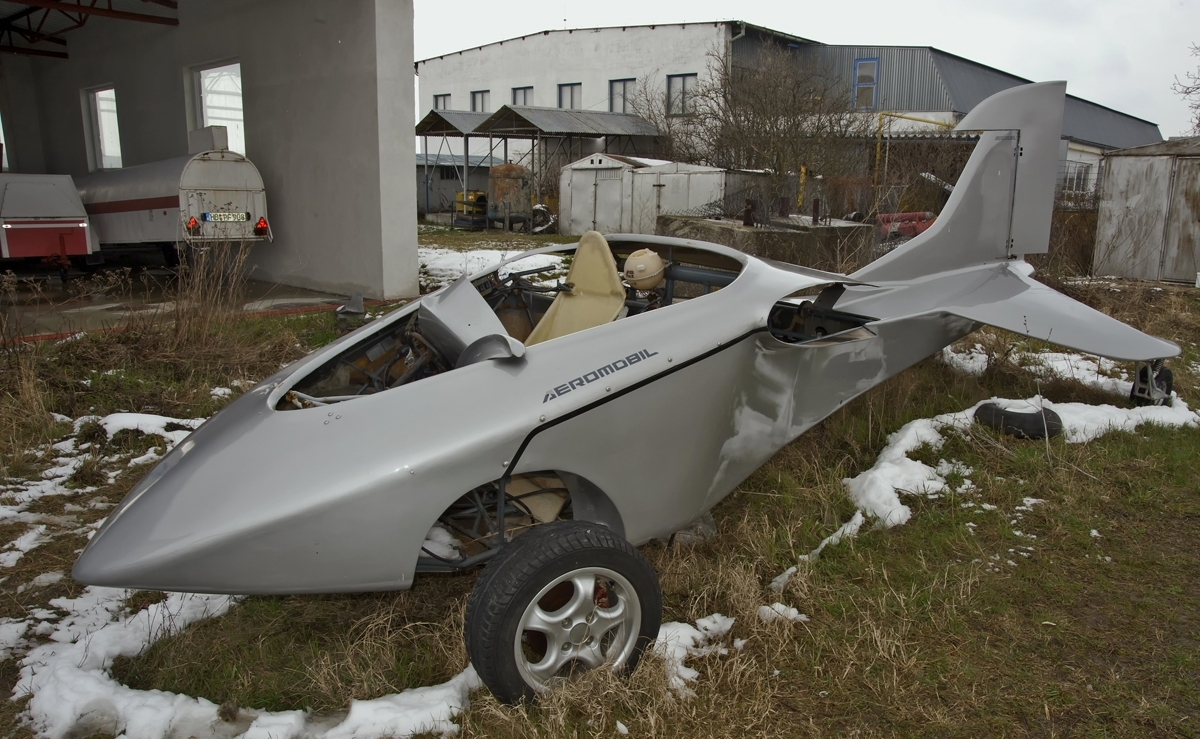 Aeromobil